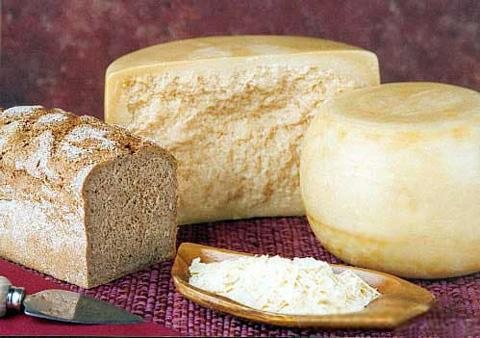 Reggianito cheese